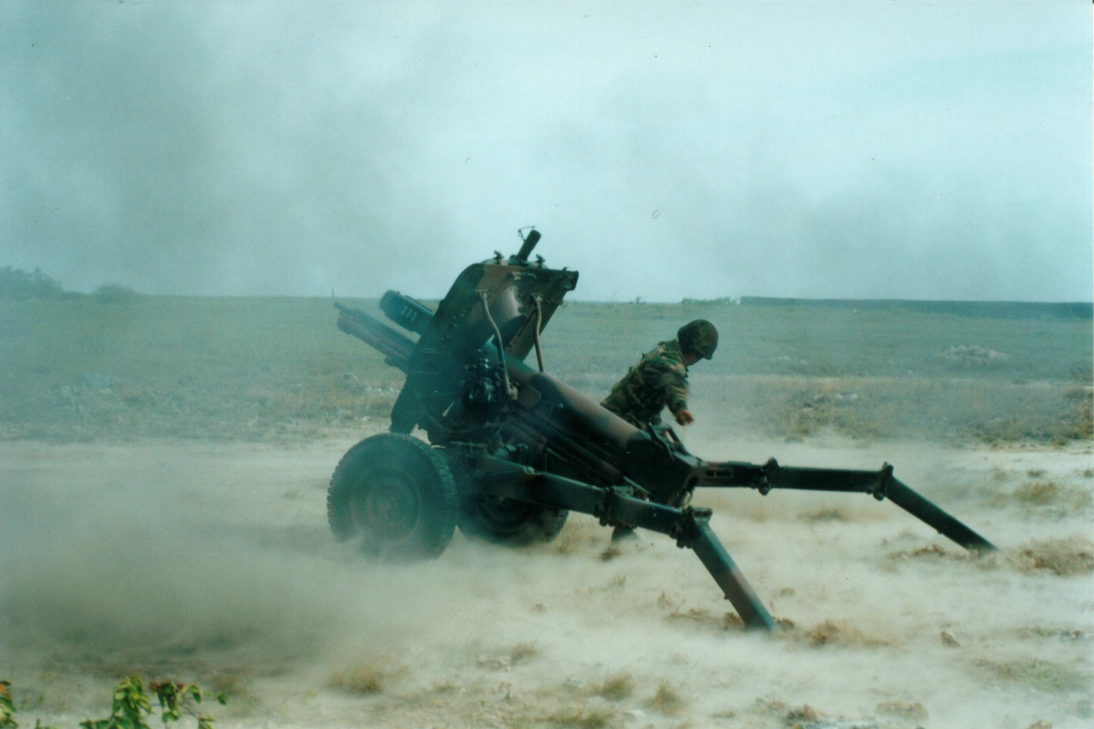 Obus M56 105/14